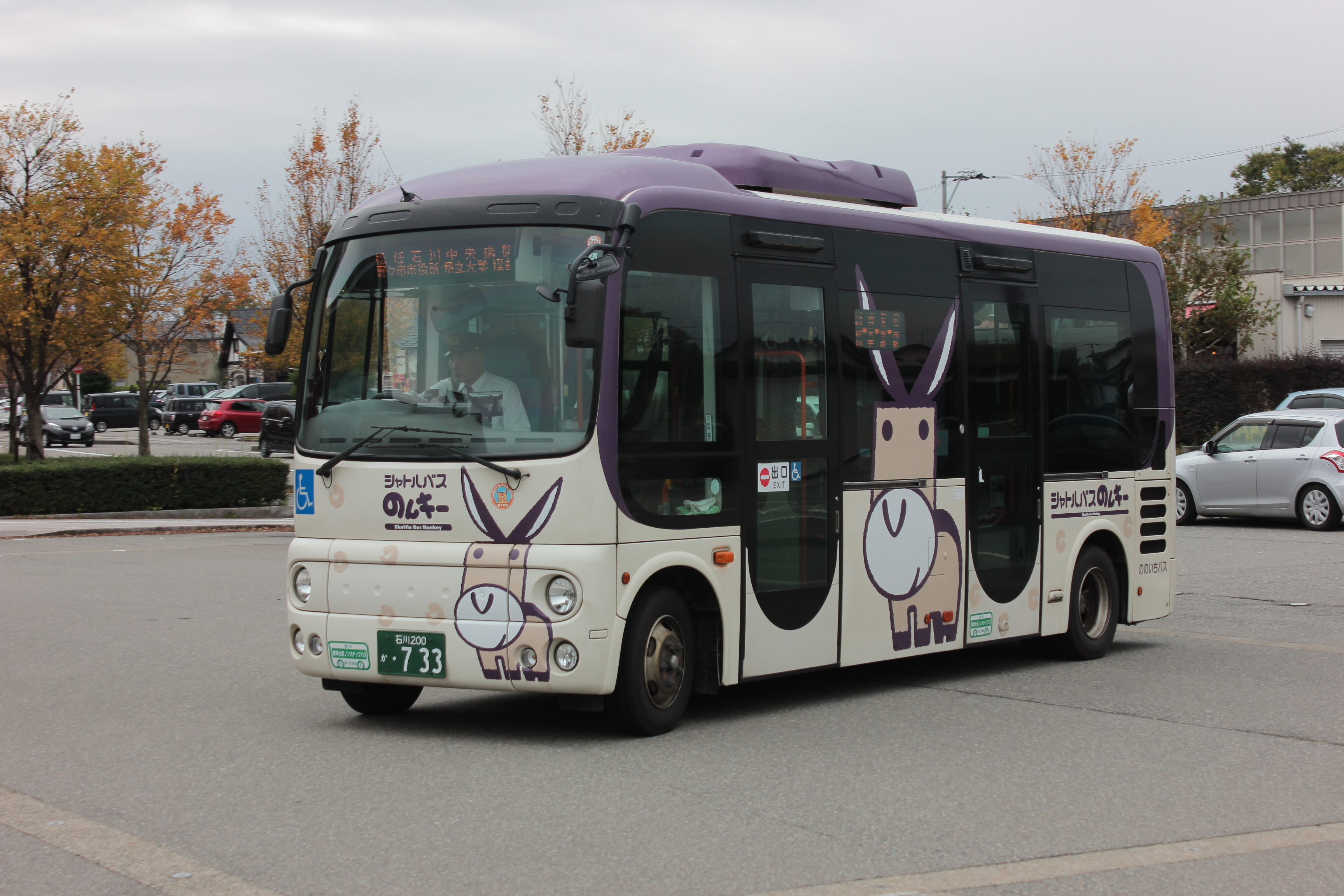 シャトルバスのんキー（野々市市役所前にて） Canon EOS Kiss X5